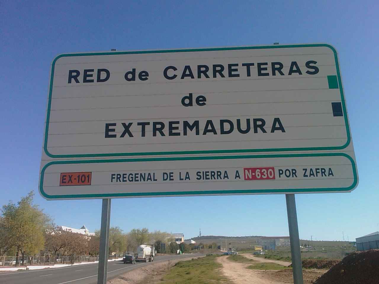 Cartel informativo EX-101, en Zafra, Badajoz